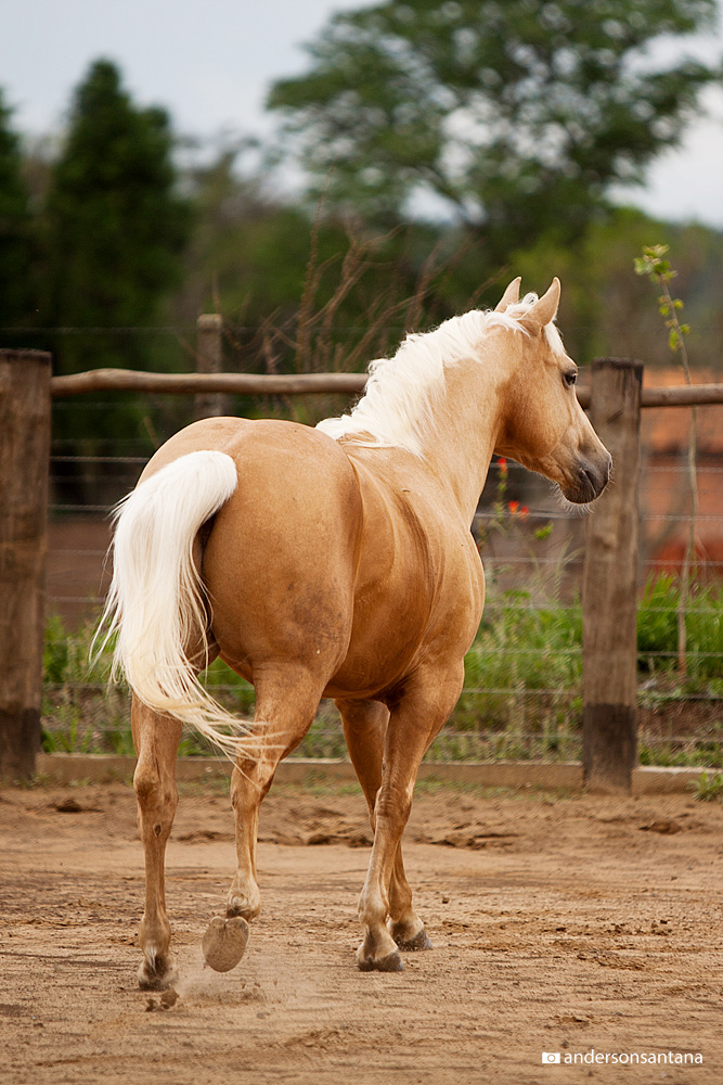 Quarto de Milha